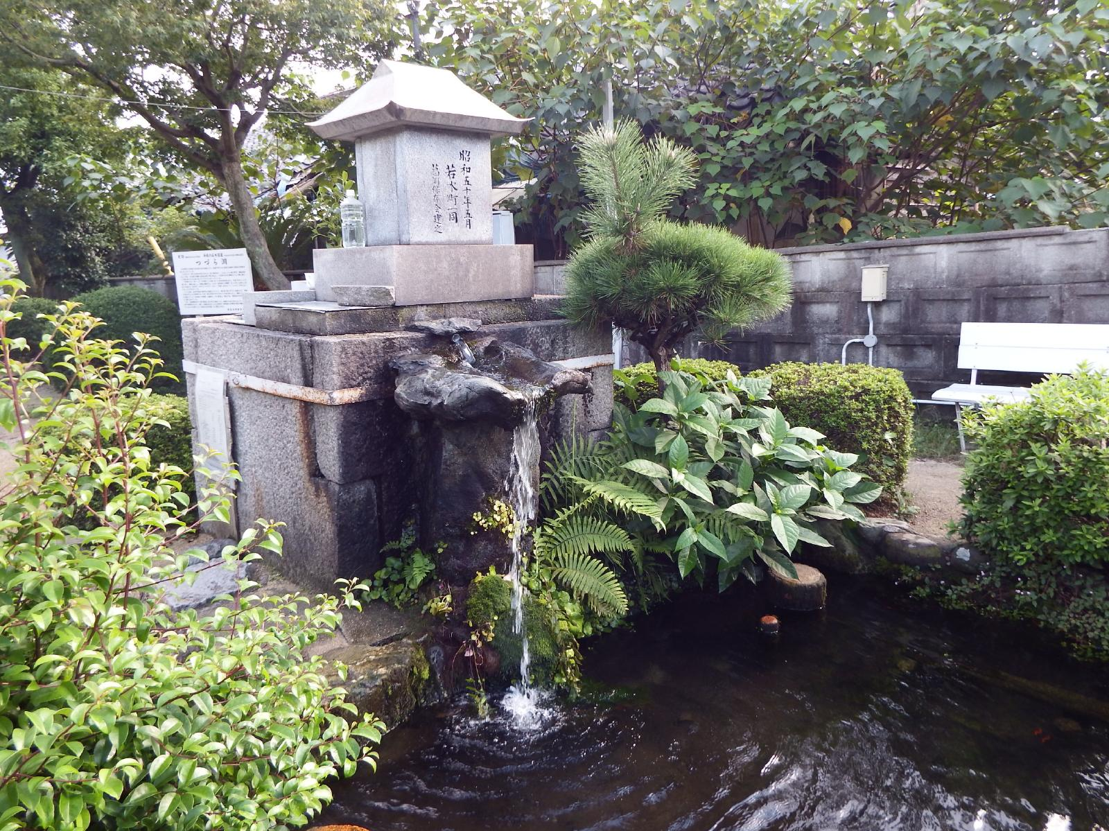 つづら淵は平成の名水百選である。